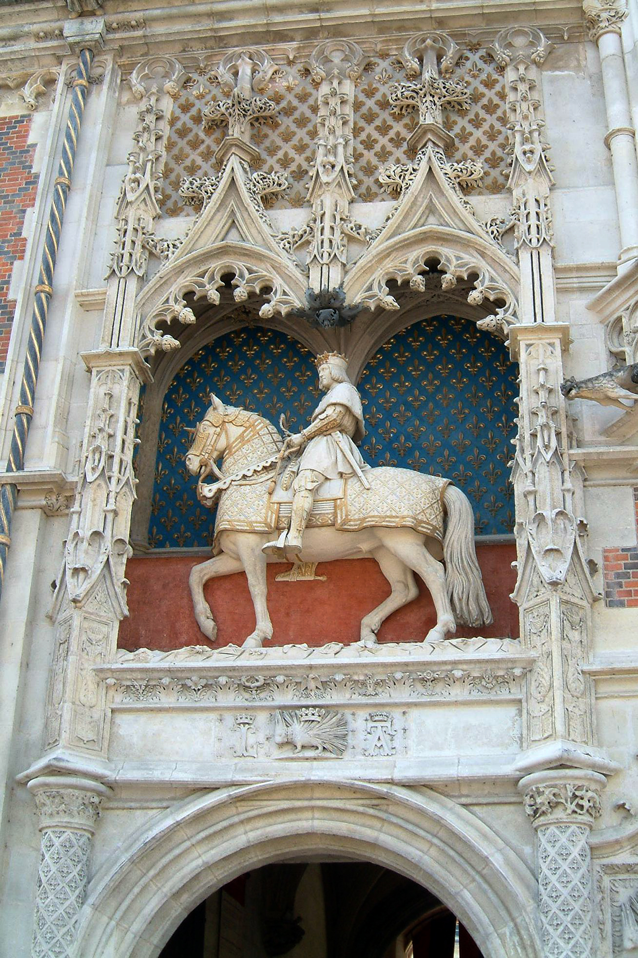 Statue équestre de Louis XII surmontant la porte d'entrée, côté extérieur, du château de Blois. L'ouvrage original, détruit pendant la révolution francaise en 1792, a été remplacé en 1858 par une copie du sculpteur Seurre. Château de Blois, Blois, FRANCE